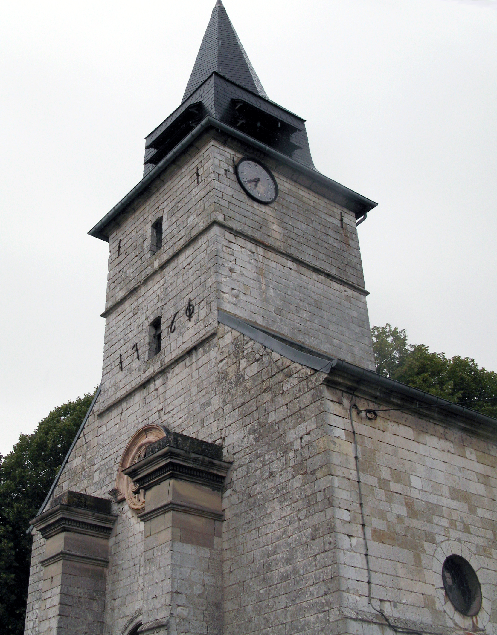 Acheux-en-Amiénois (Somme, France) - . (La photo a été prise sous la pluie.)